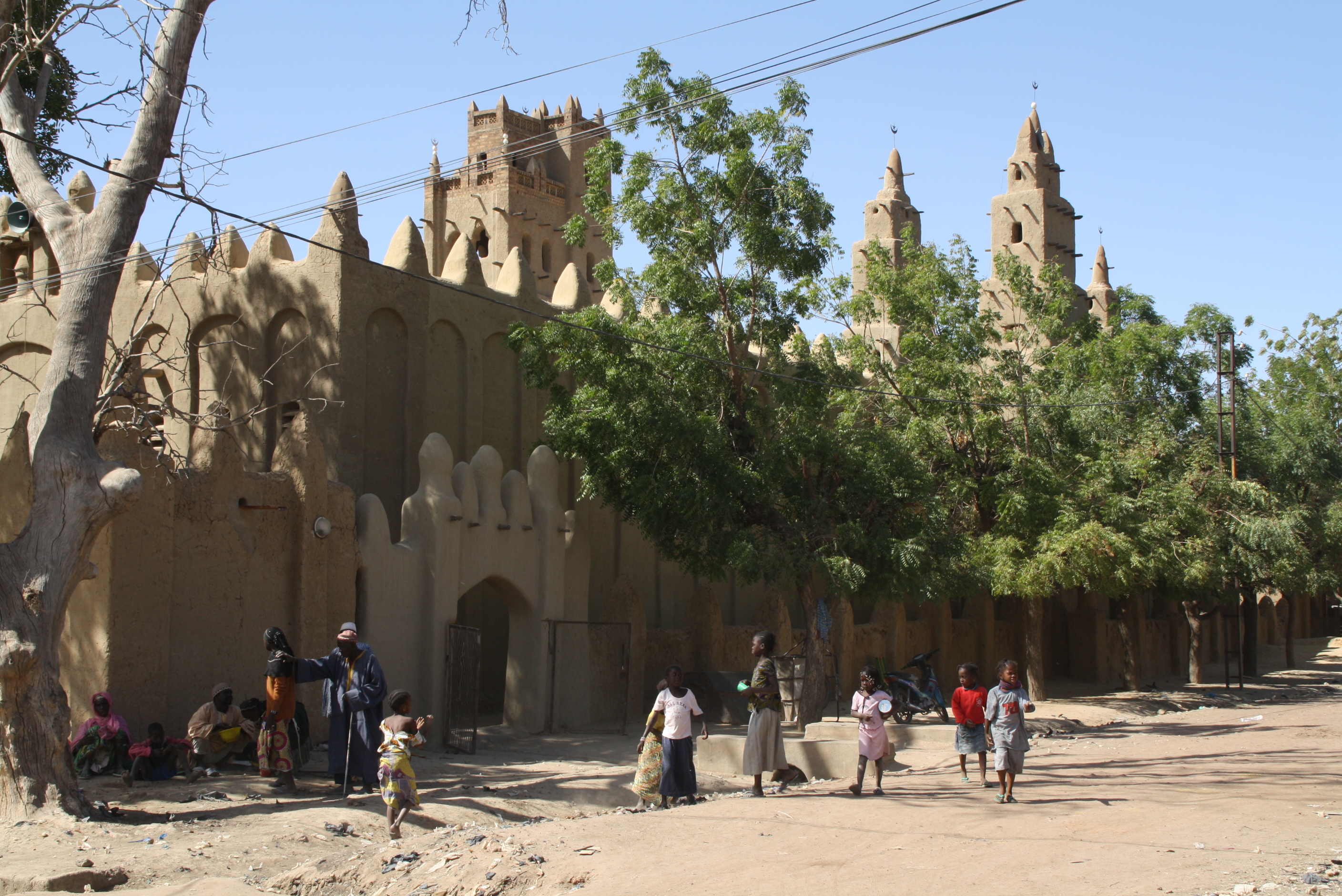 Grande Mosquée du Vendredi, d'architecture soudanaise